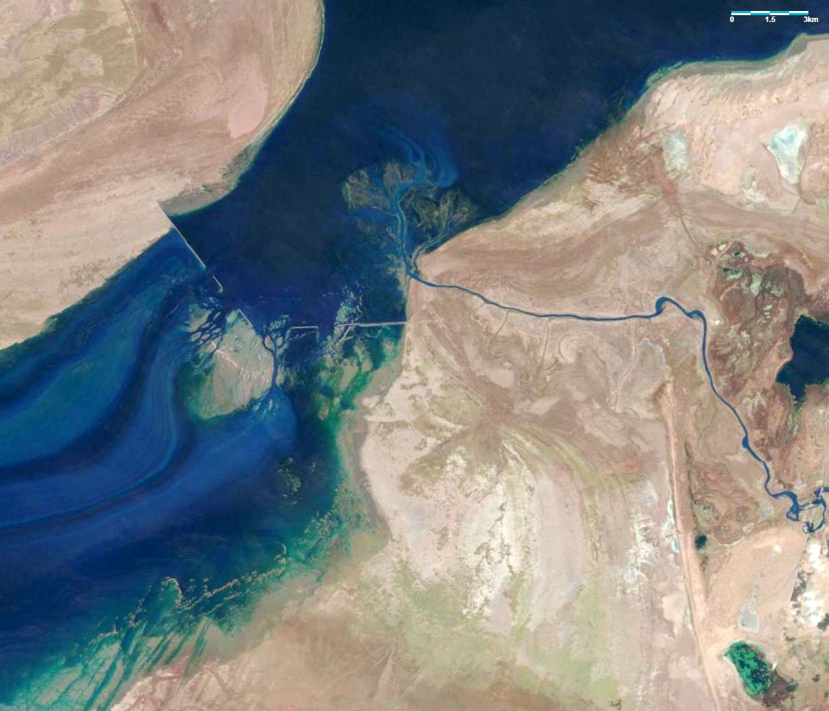 Satellitenaufnahme vom 30. April 1999, die den Bruch des Kokaral-Dammes zeigt